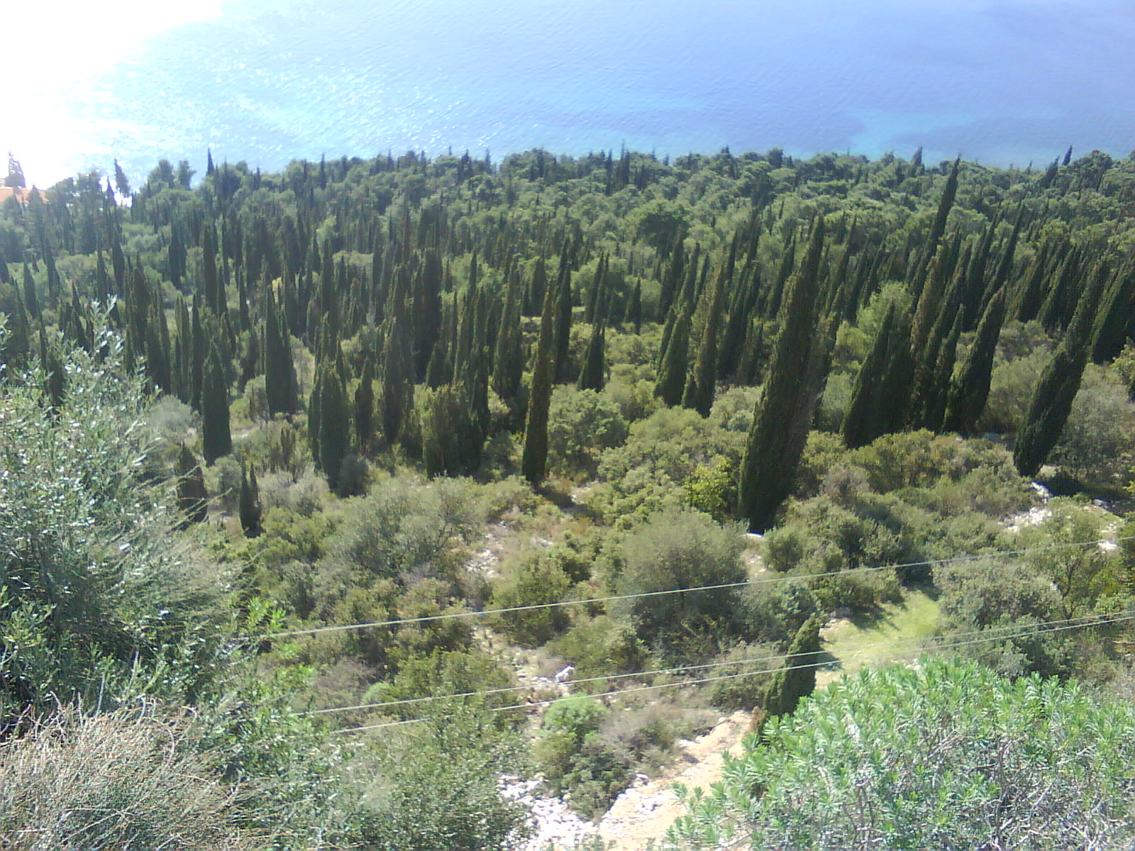 Forest above Orebić